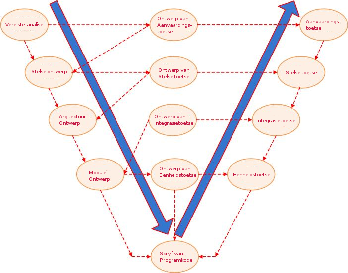 Die V-Model projekbestuursmetode vir sagteware ontwikkeling